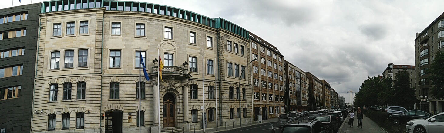 Wilhelmsraße mit Blick auf die ehemalige Dienstwohung von Konrad Adenauer, September 2015